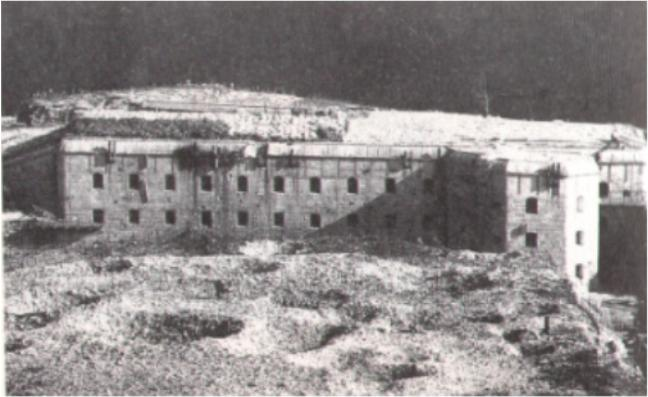 Fort Belvedere-Gschwendt